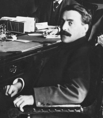 Jean Prévost, circa 1905.